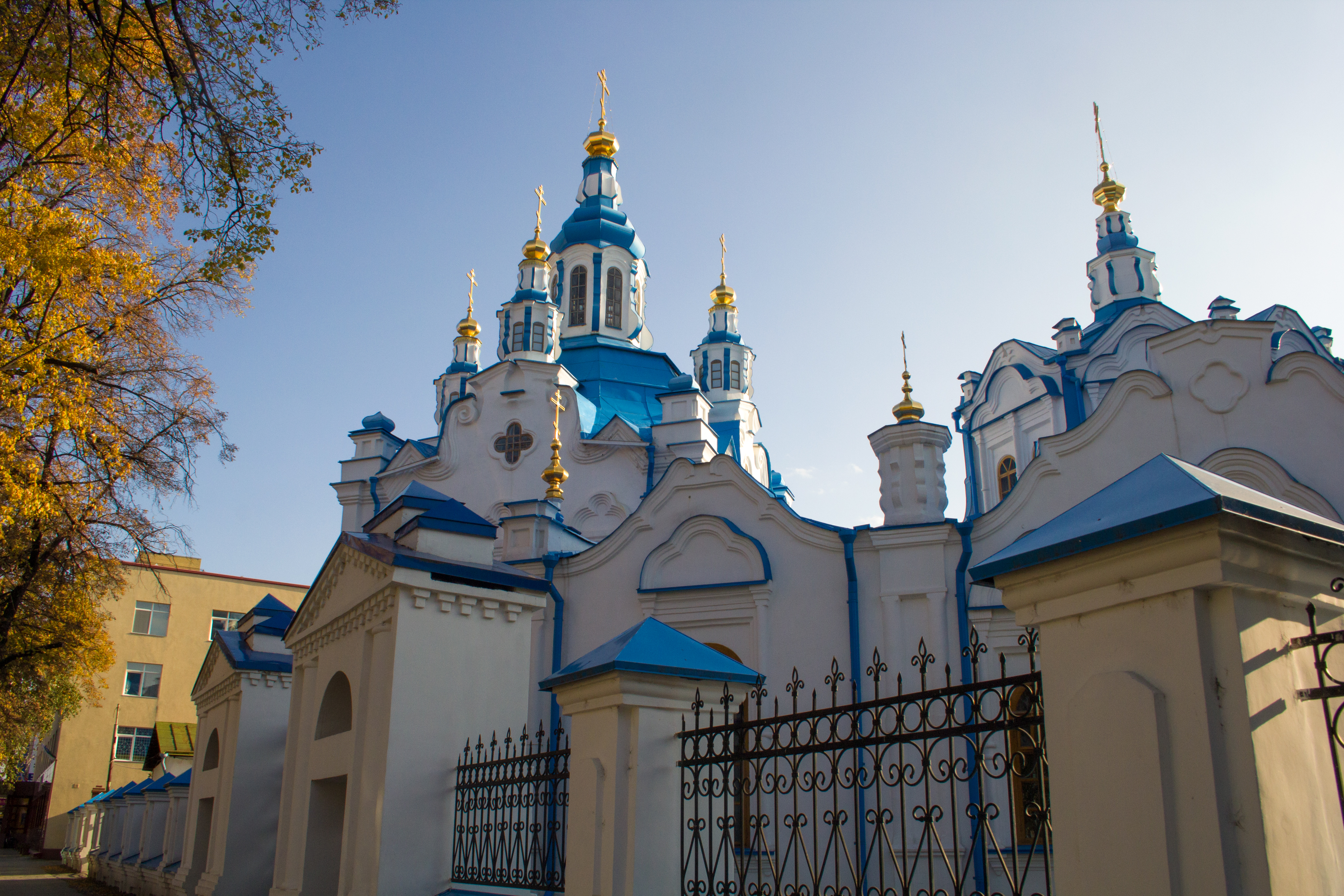 Знаменский собор: улица Семакова, 13, Тюмень, Тюменская область